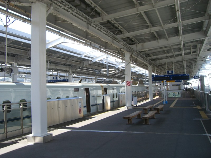 鹿児島中央駅新幹線ホーム（2013年5月）